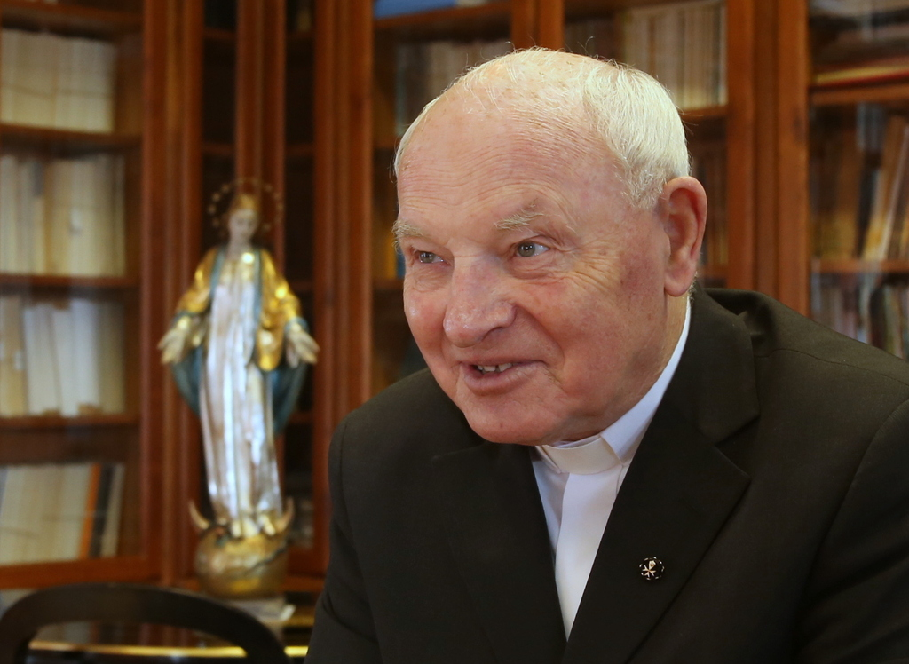 Imre atya, a 25 éve működő Magyar Máltai Szeretetszolgálat vezetője